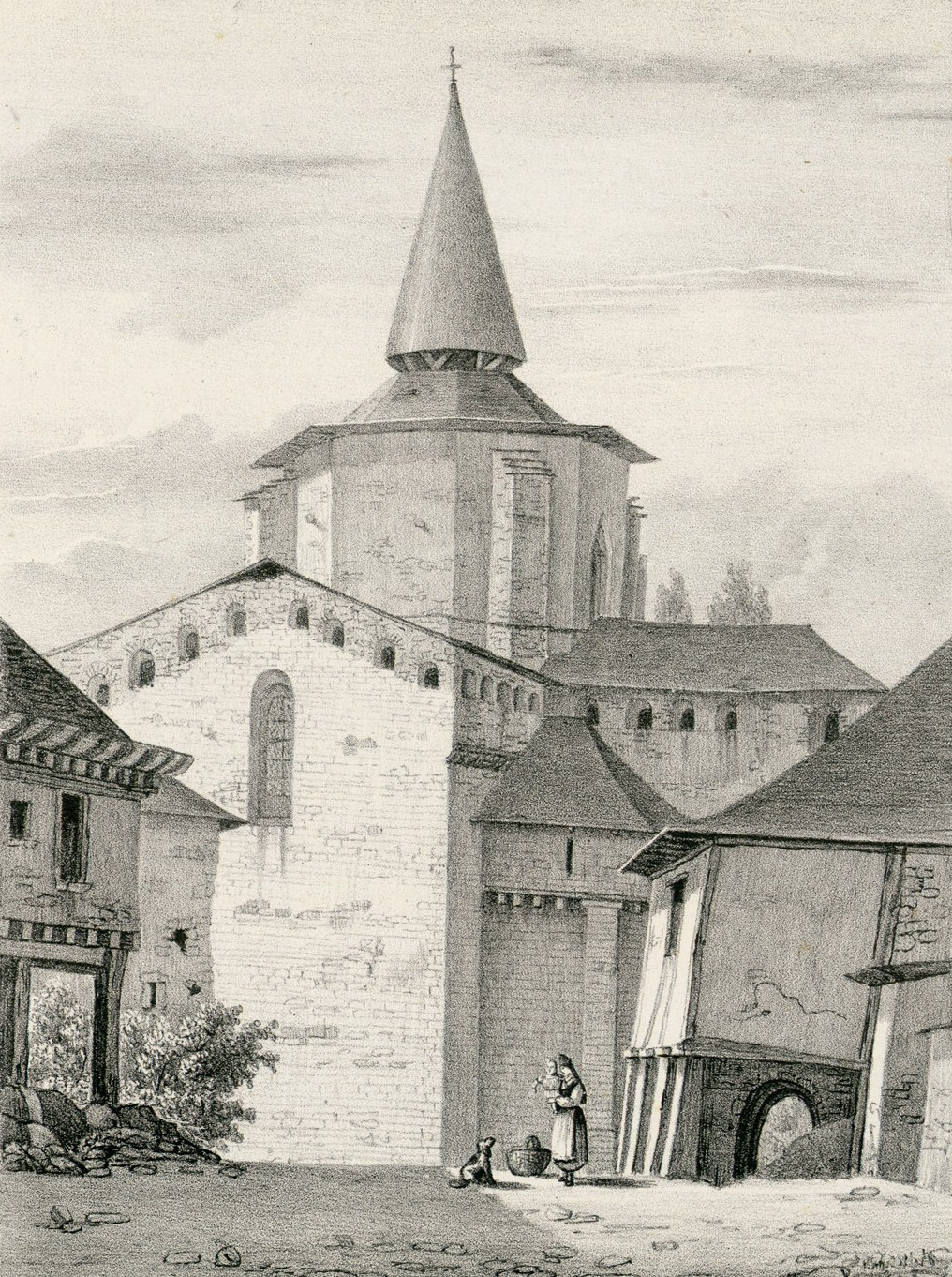 Le monastère de Saint-Savin (Hautes-Pyrénées) en 1828, lithographie de Paul-Jean-Pierre Gélibert